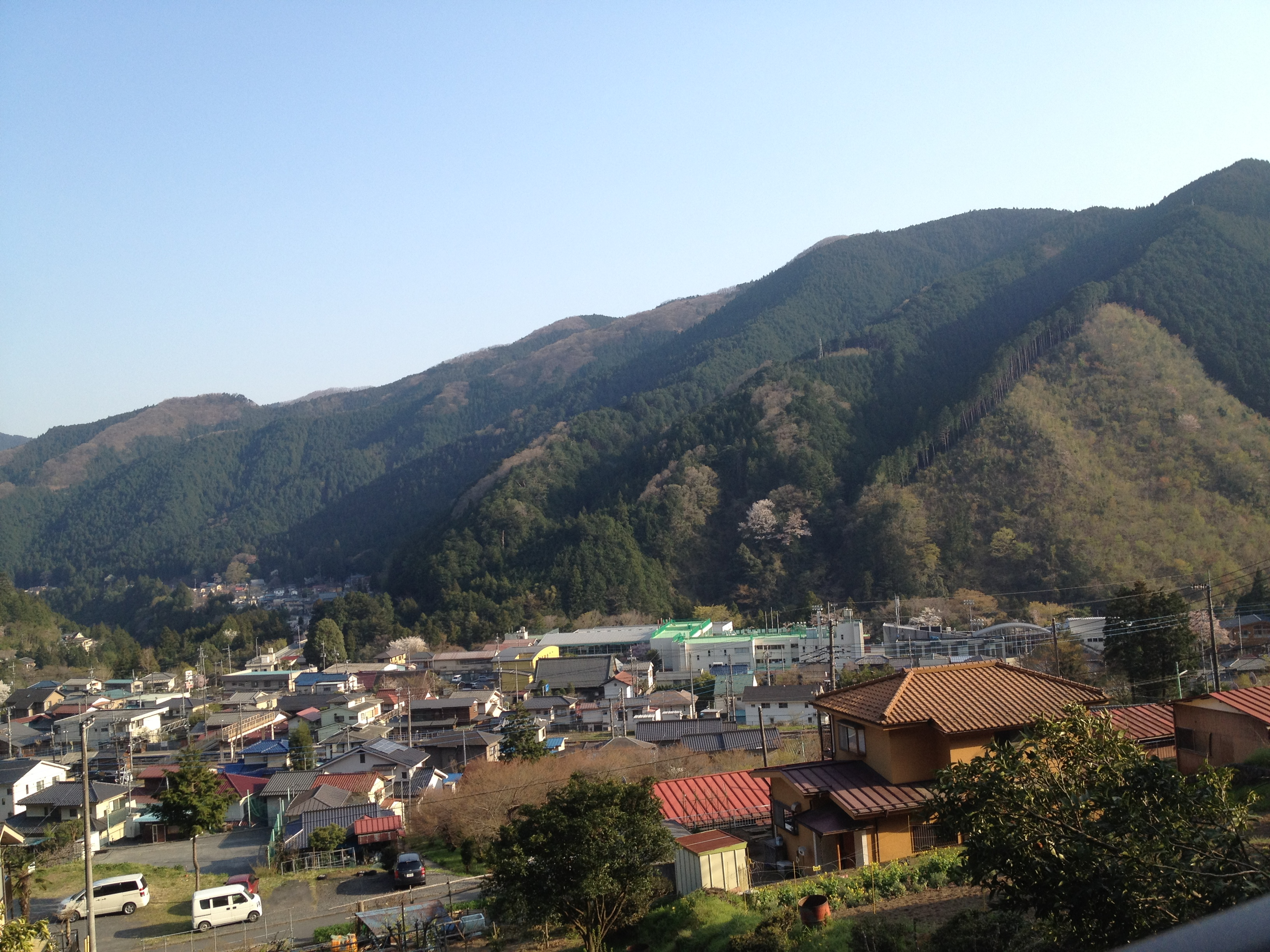 小丹波地区の高台から眺める奥多摩町立古里小学校